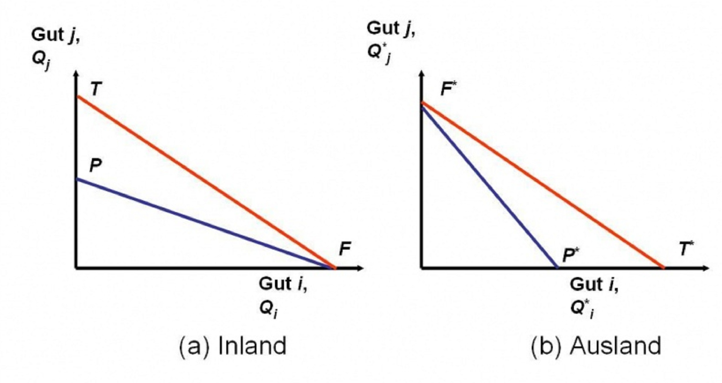 Grafische Verdeutlichung der Realisierung von Außenhandelsgewinnen